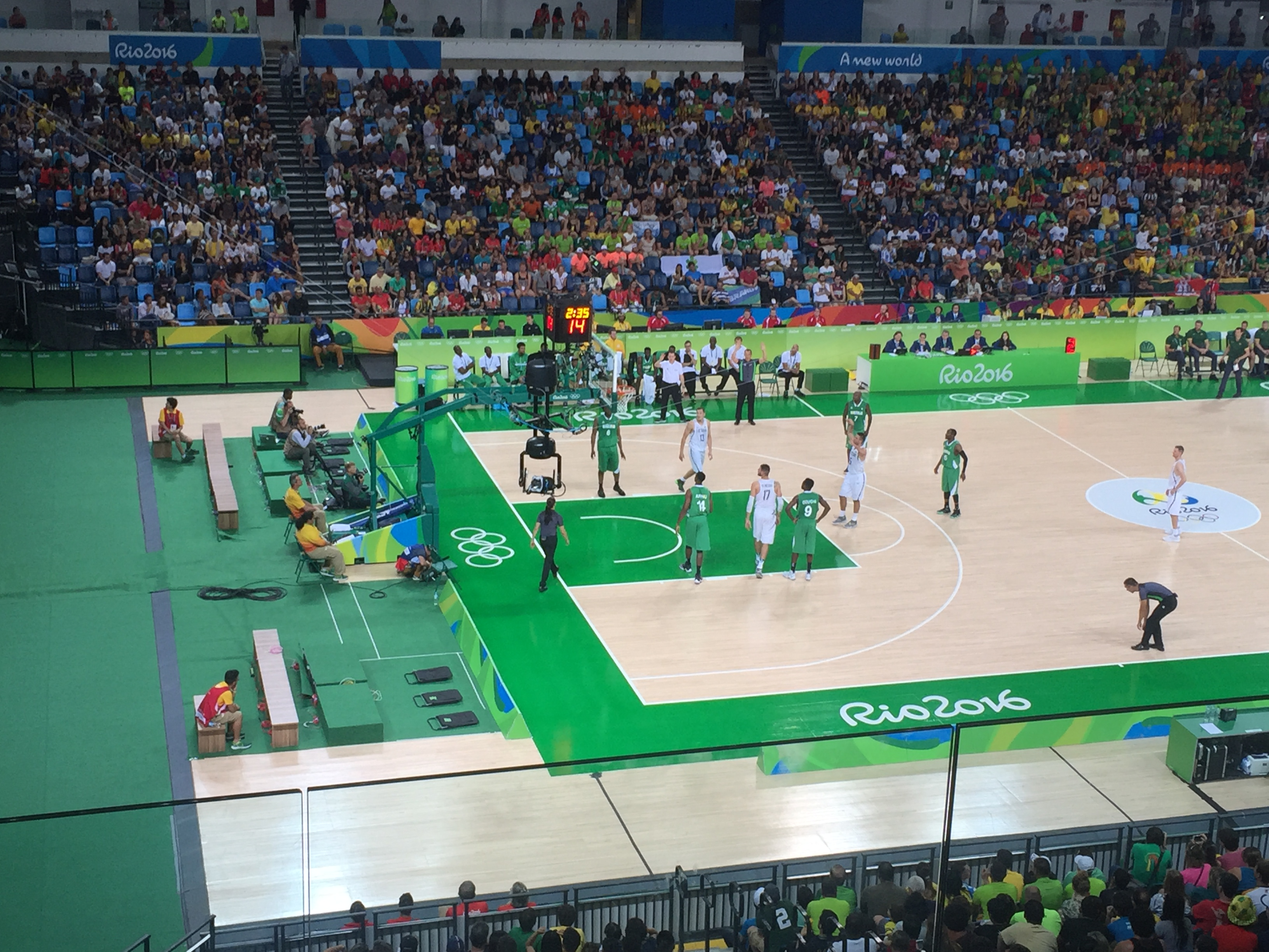 Rio 2016 - Men's basketball LTU-NIG